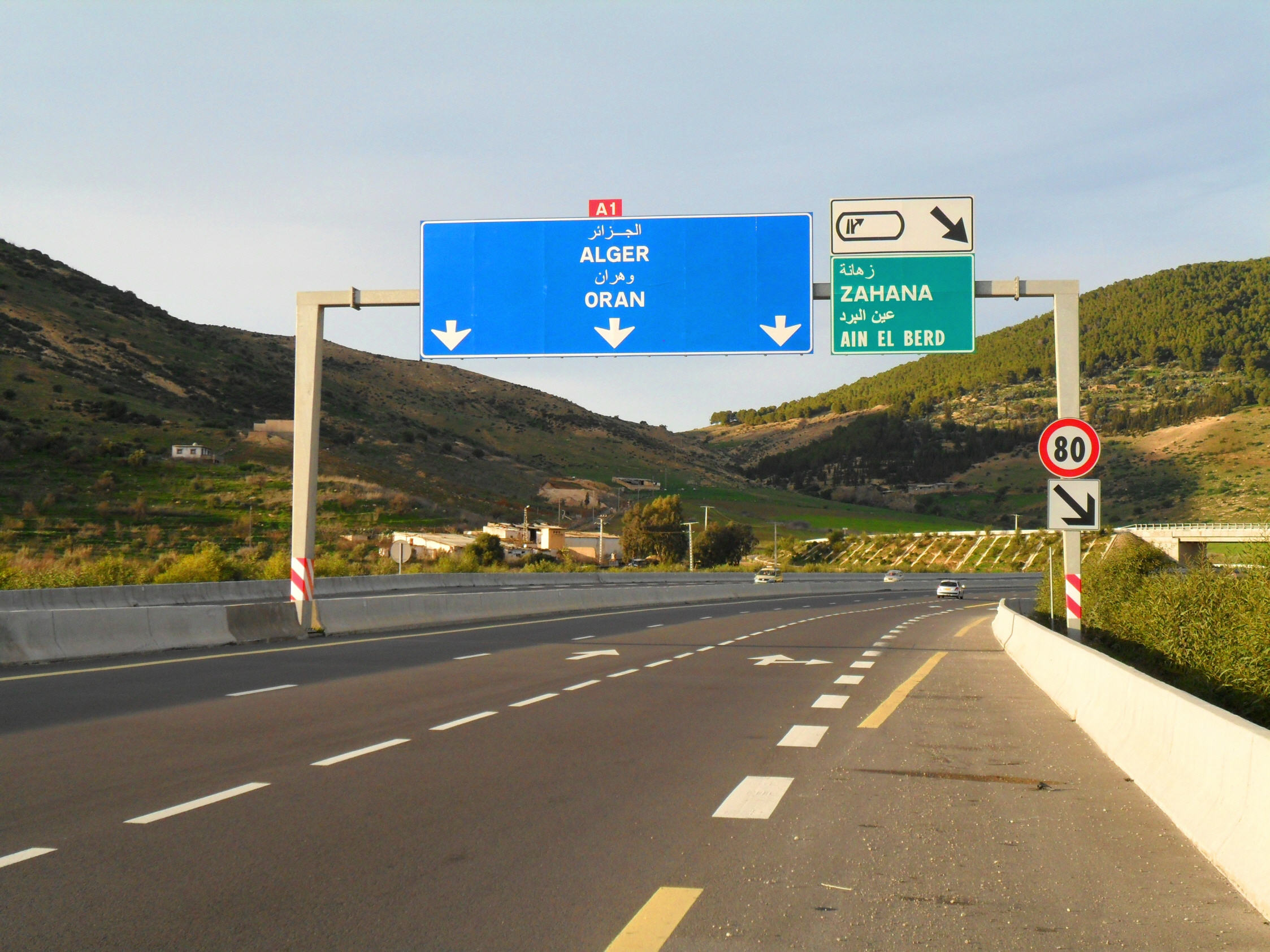 tronçon ouest de l'autoroute A1 الجزء الغربي للطريق السيار شرق غرب